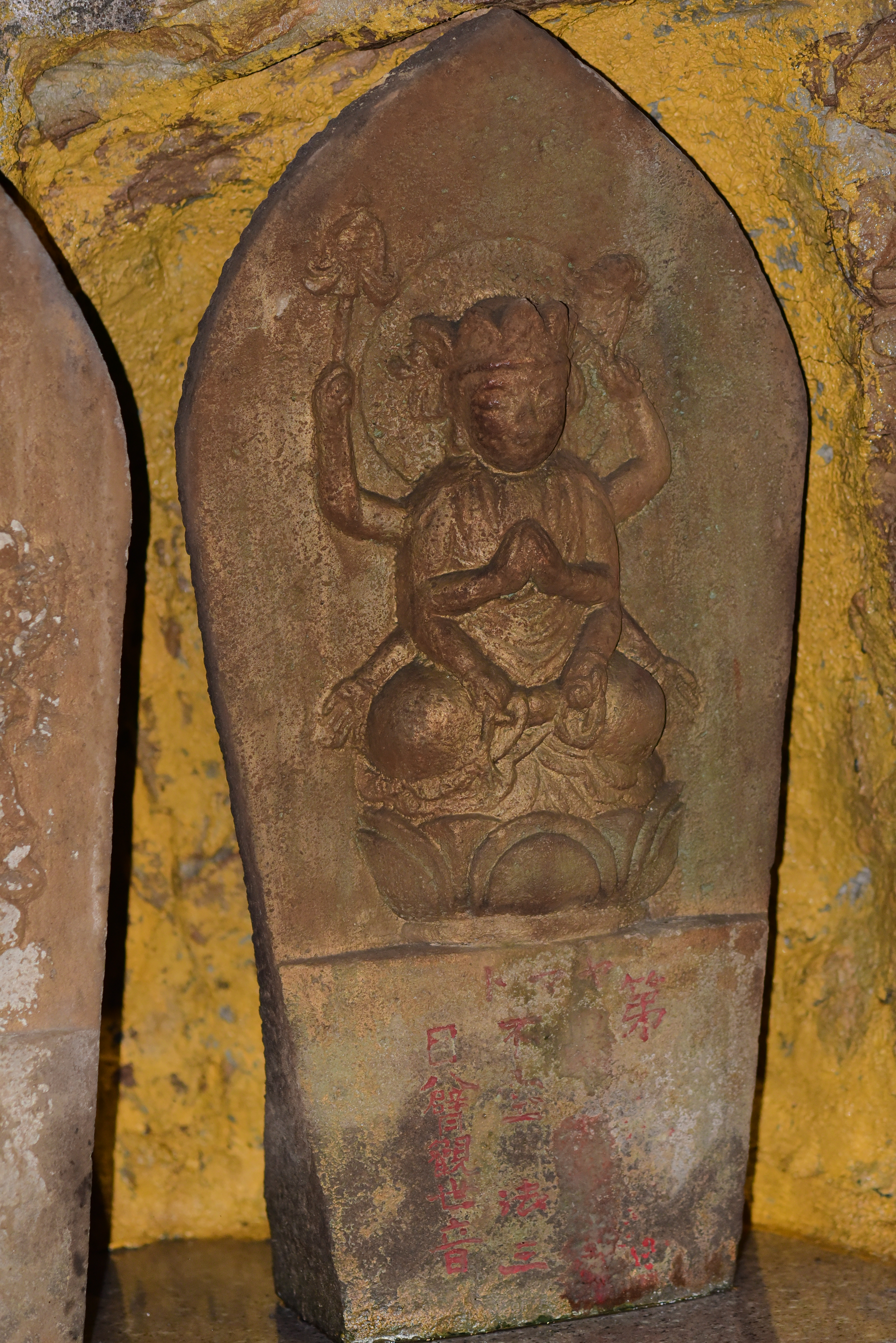 2018 Keelung Fairy Cave 第九番興福寺不空絹索三目八臂觀世音 基隆仙洞巖西国三十三所札所石佛